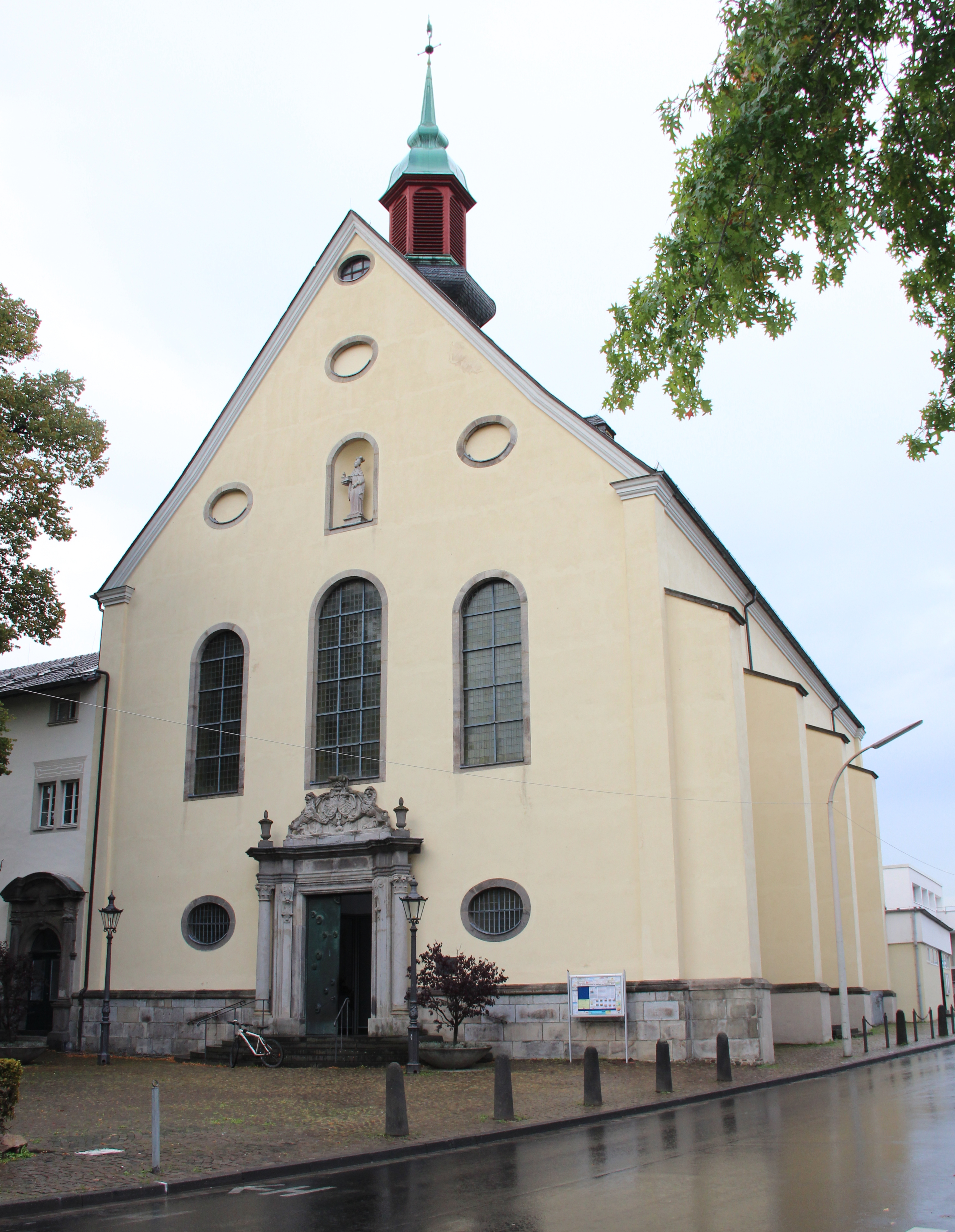 Die Kirche Sankt Adelheid am Pützchen, Karmeliterstraße